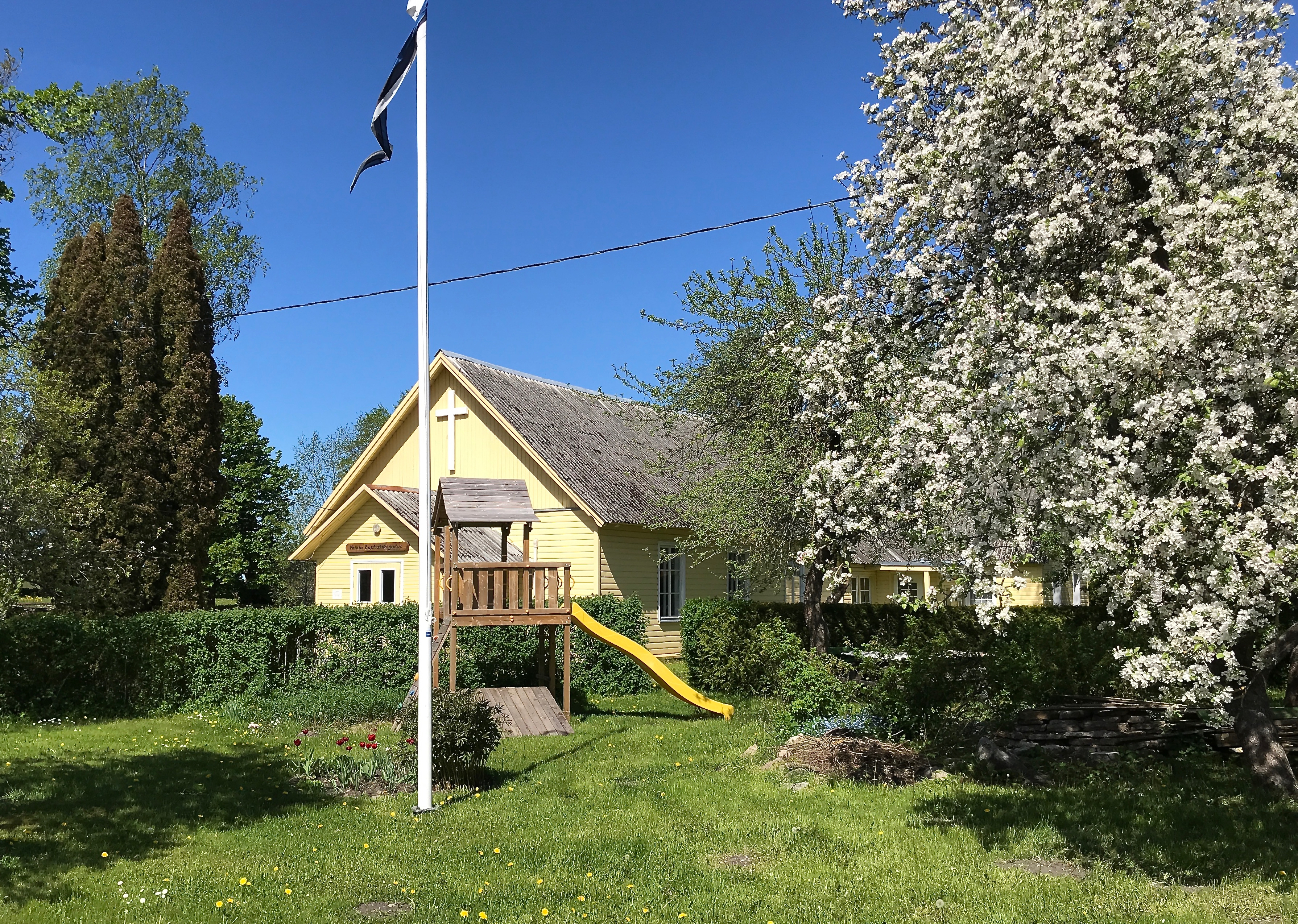 Valkla baptisti palvela